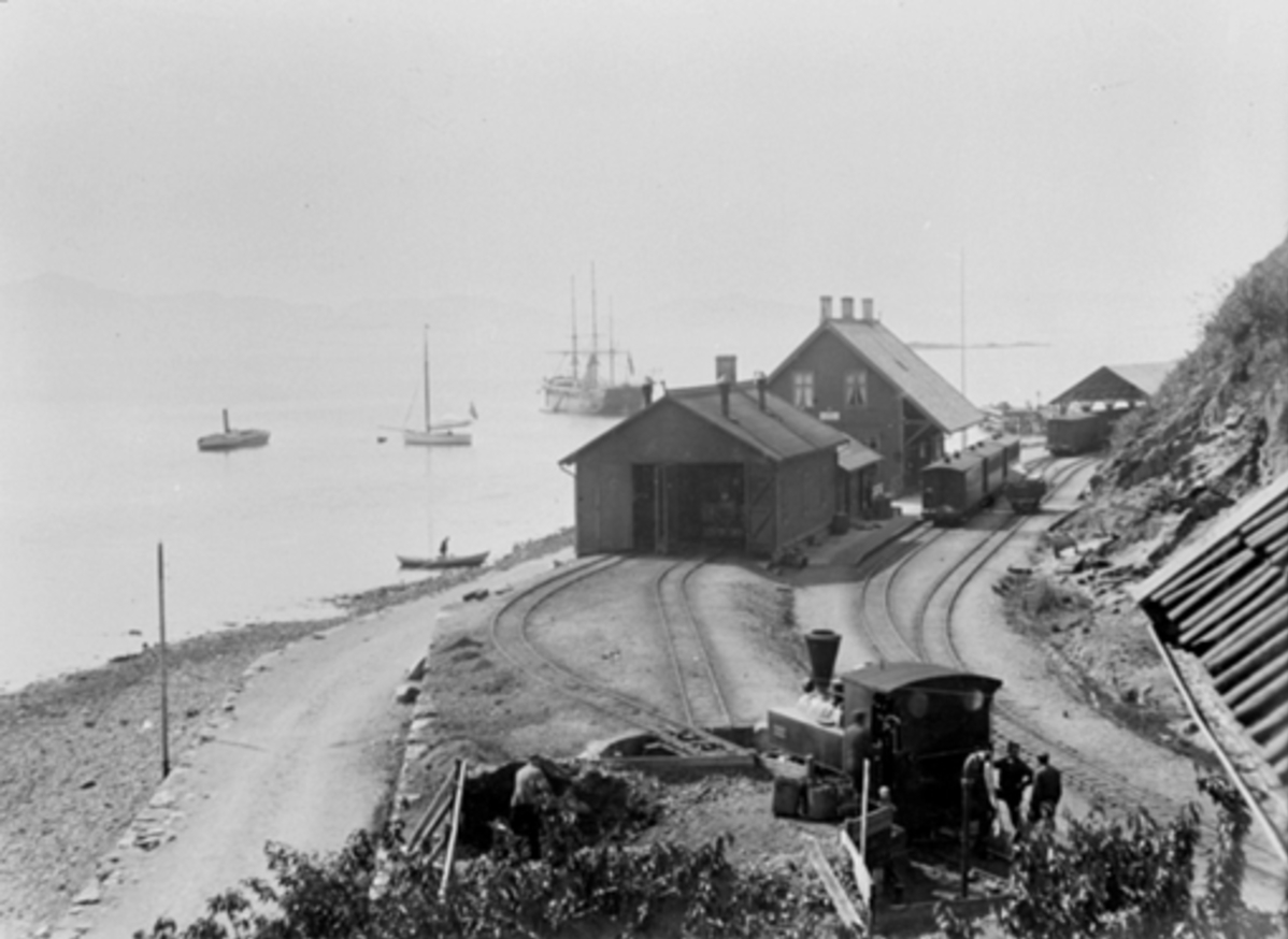 Oversiktsbilde over Osøren stasjon